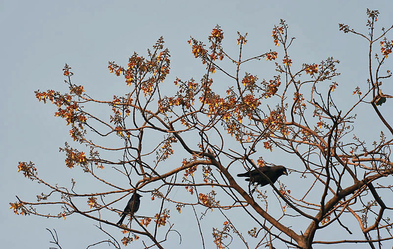 Gamhar or Kashmir Teak Gmelina arborea in Kolkata, West Bengal, India.